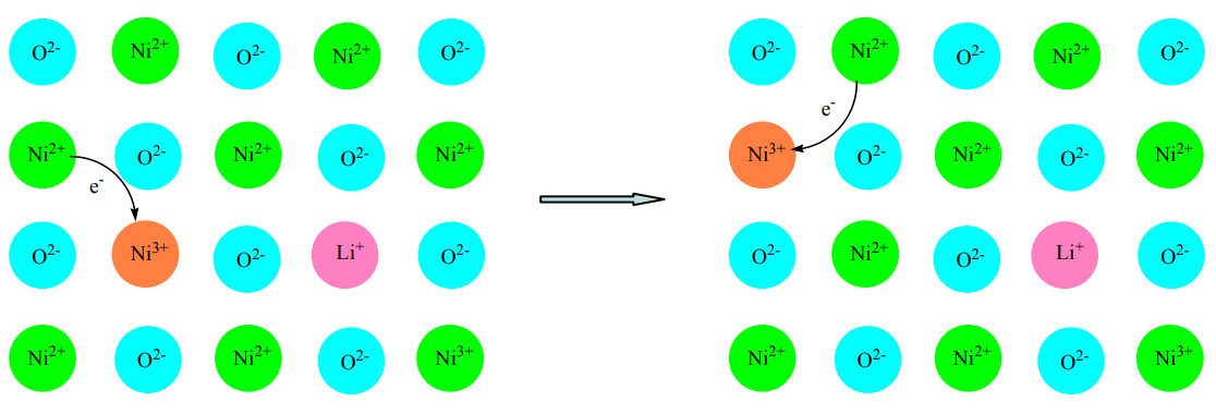 Solido ez-purua